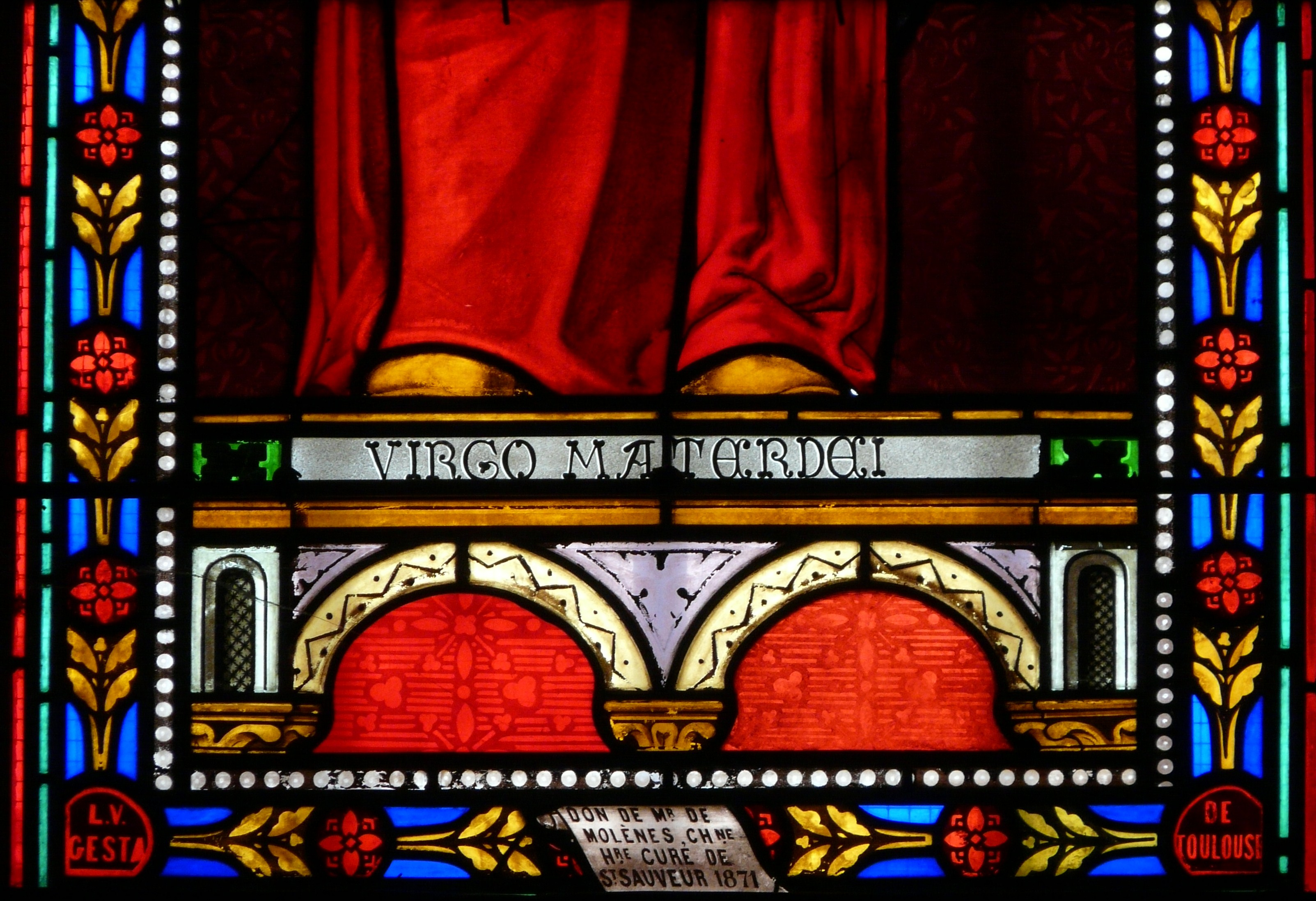 Signature de Louis-Victor Gesta sur le vitrail représentant la Vierge à l'Enfant, église Transfiguration de Notre-Seigneur, Saint-Sauveur, Dordogne, France.